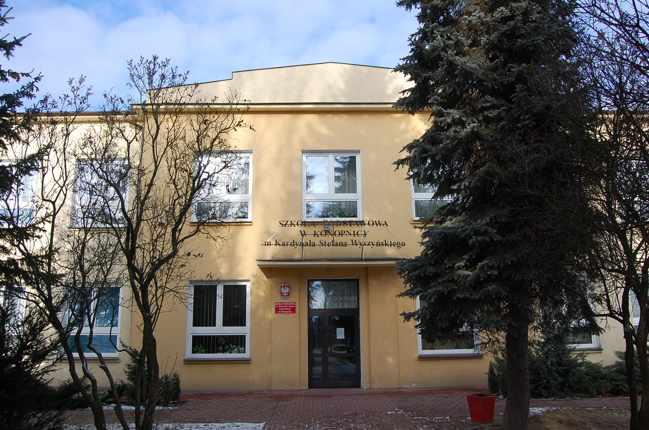 Szkoła Podstawowa w Konopnicy